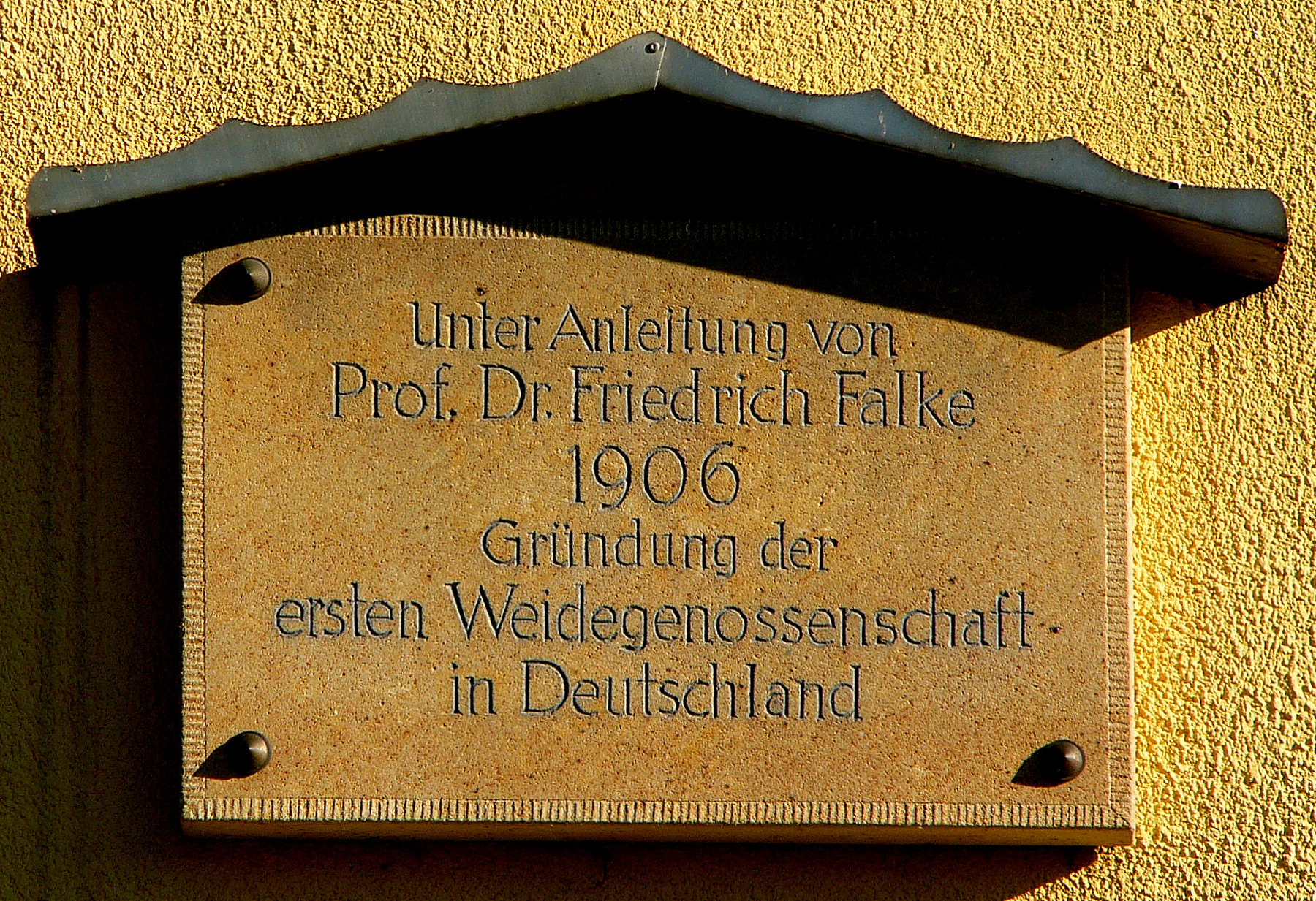 Gedenktafel für Friedrich Falke in Ehrenberg OT Hohnstein (Sächsische Schweiz)